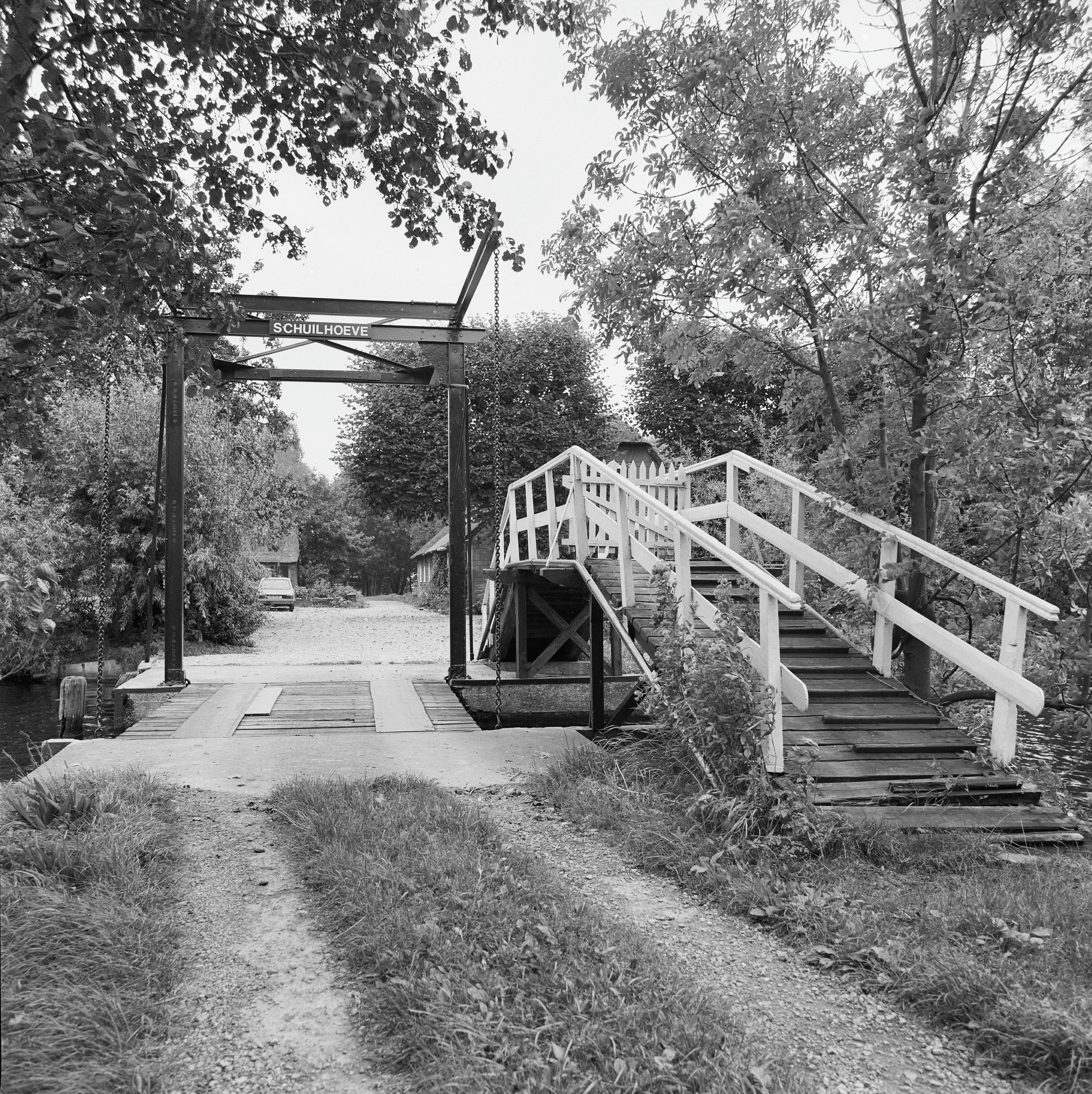 houten ophaalbrug met kwakel